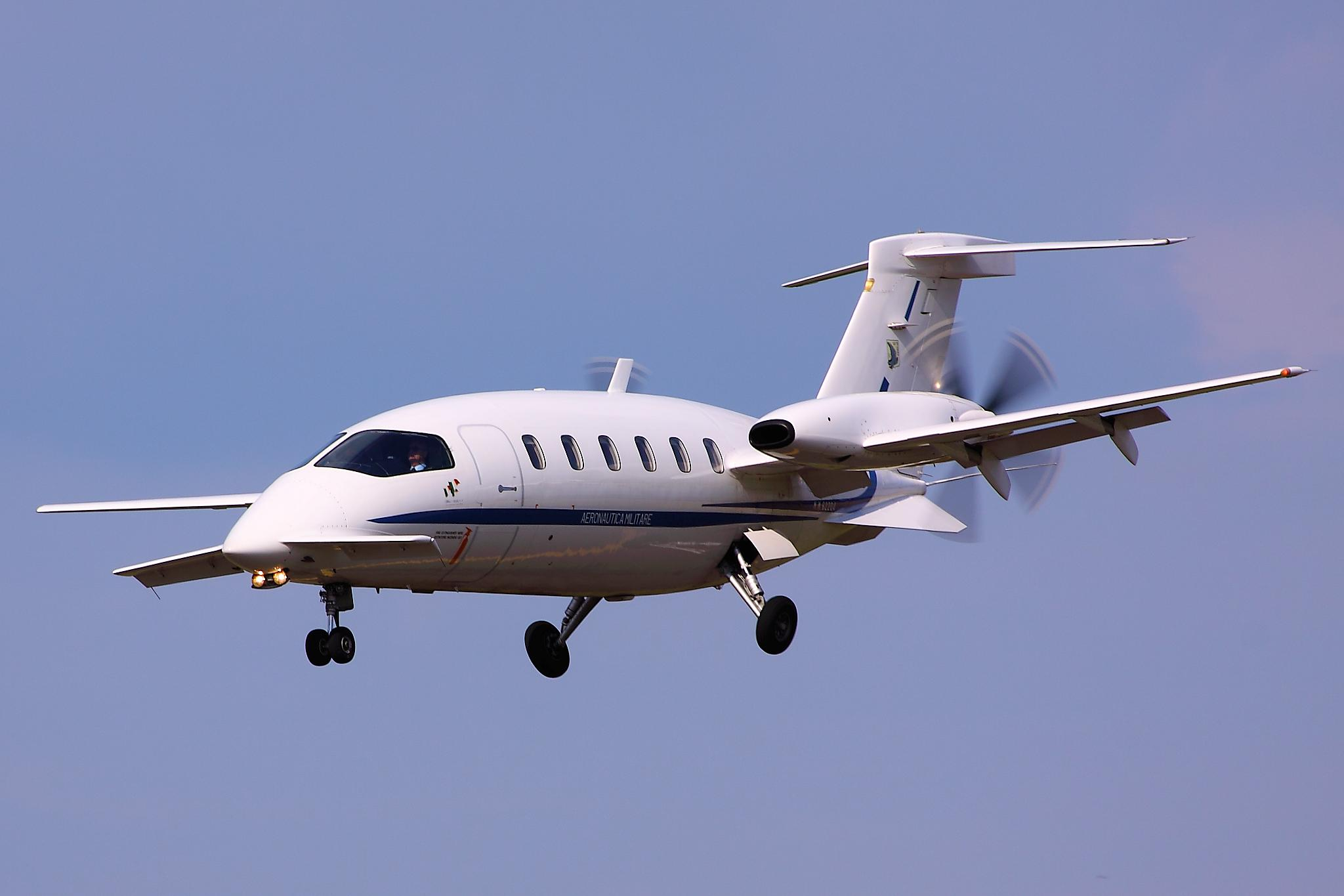 Piaggio P180 Avanti - RIAT 2011